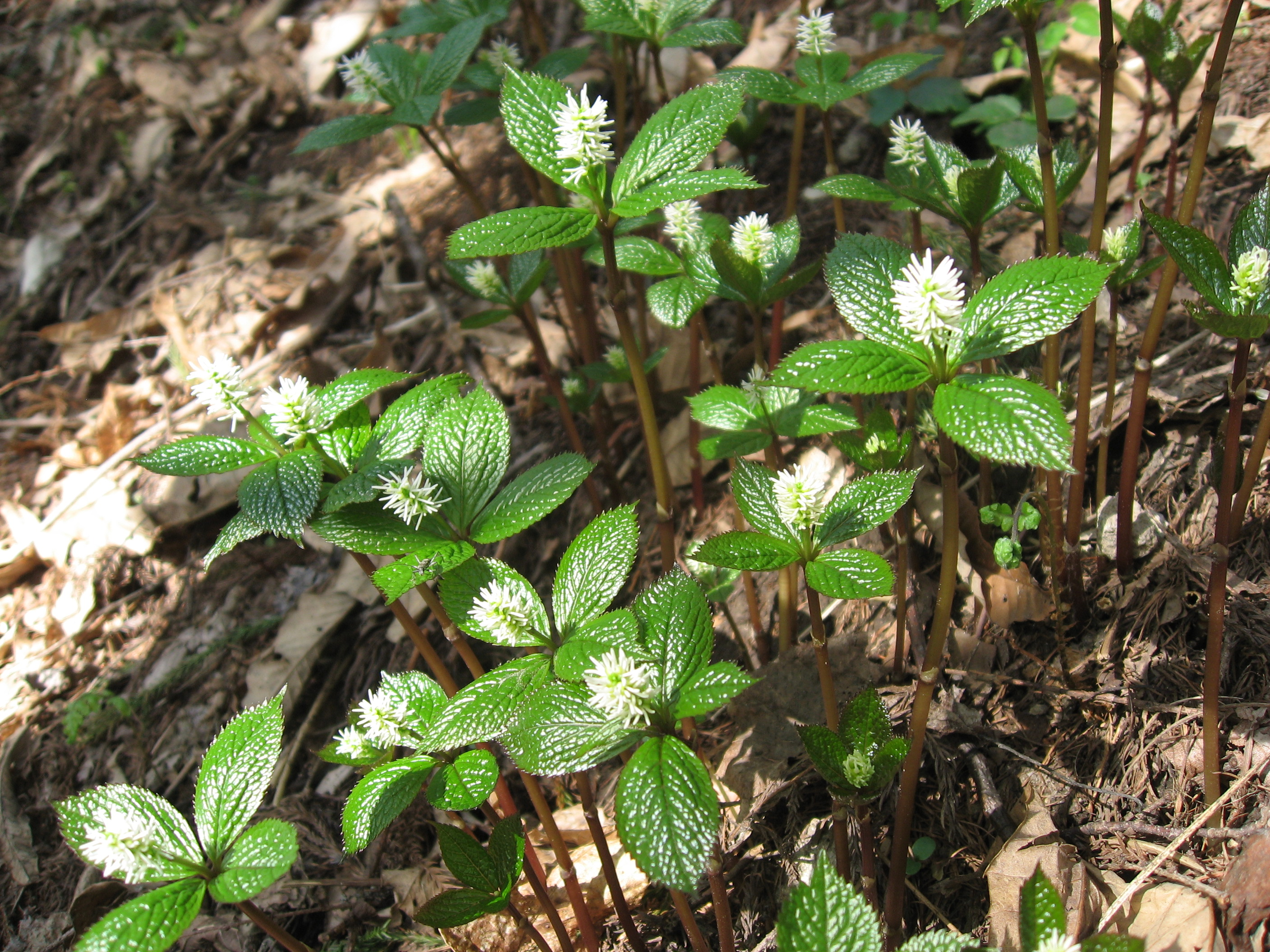 ヒトリシズカ_Chloranthus_japonicus.JPG